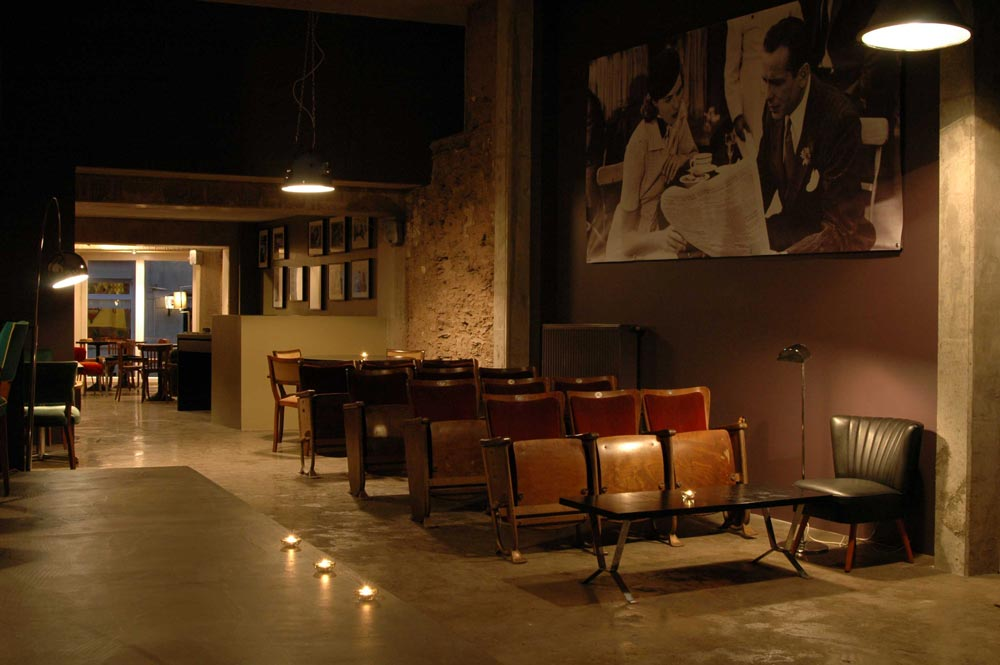 Den ale Kino zu Veianen.